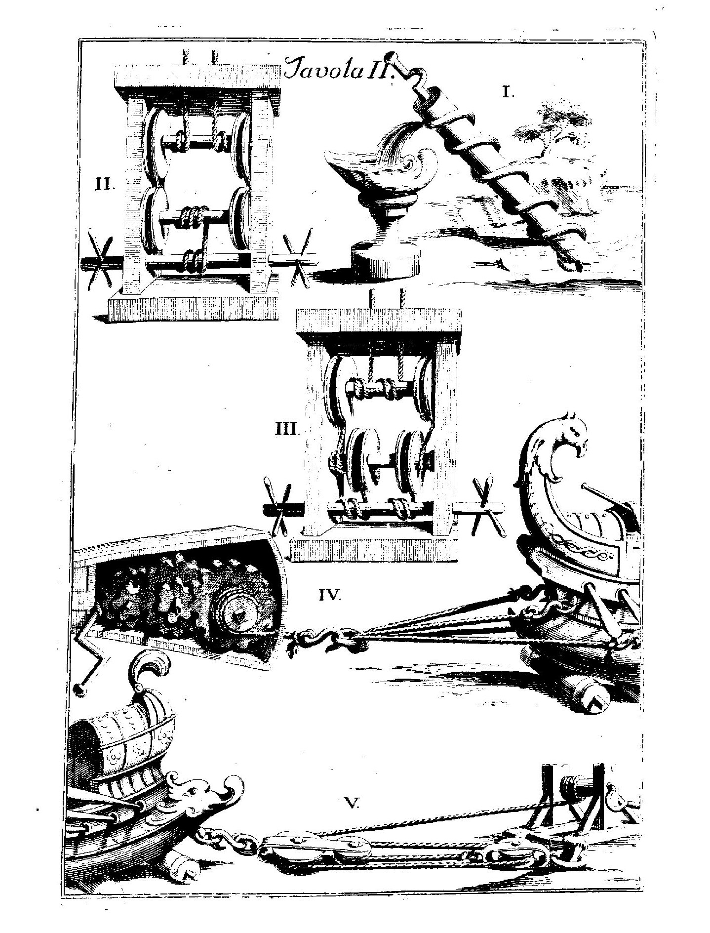 Notizie istoriche e critiche intorno alla vita, alle invenzioni, ed agli scritti di Archimede siracusano del co. Gian-Maria Mazzucchelli bresciano. - In Brescia : presso Gian-Maria Rizzardi, 1737. - [16], 128 p., IV c. di tav. : ill. calcografiche ; 4º. - Vignetta calcografica sul front., 2 iniziali e 2 testate calcografiche, incise da C. Orsolini su disegni di P. Scalvino .